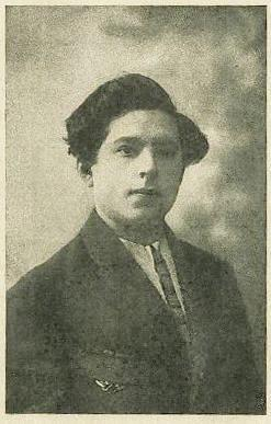 Всеволод Проханов - младший сын Ивана Степановича Проханова. Трагически погиб в результате неосторожного обращения с оружием 23 июля 1926 года в возрасте 22 лет.